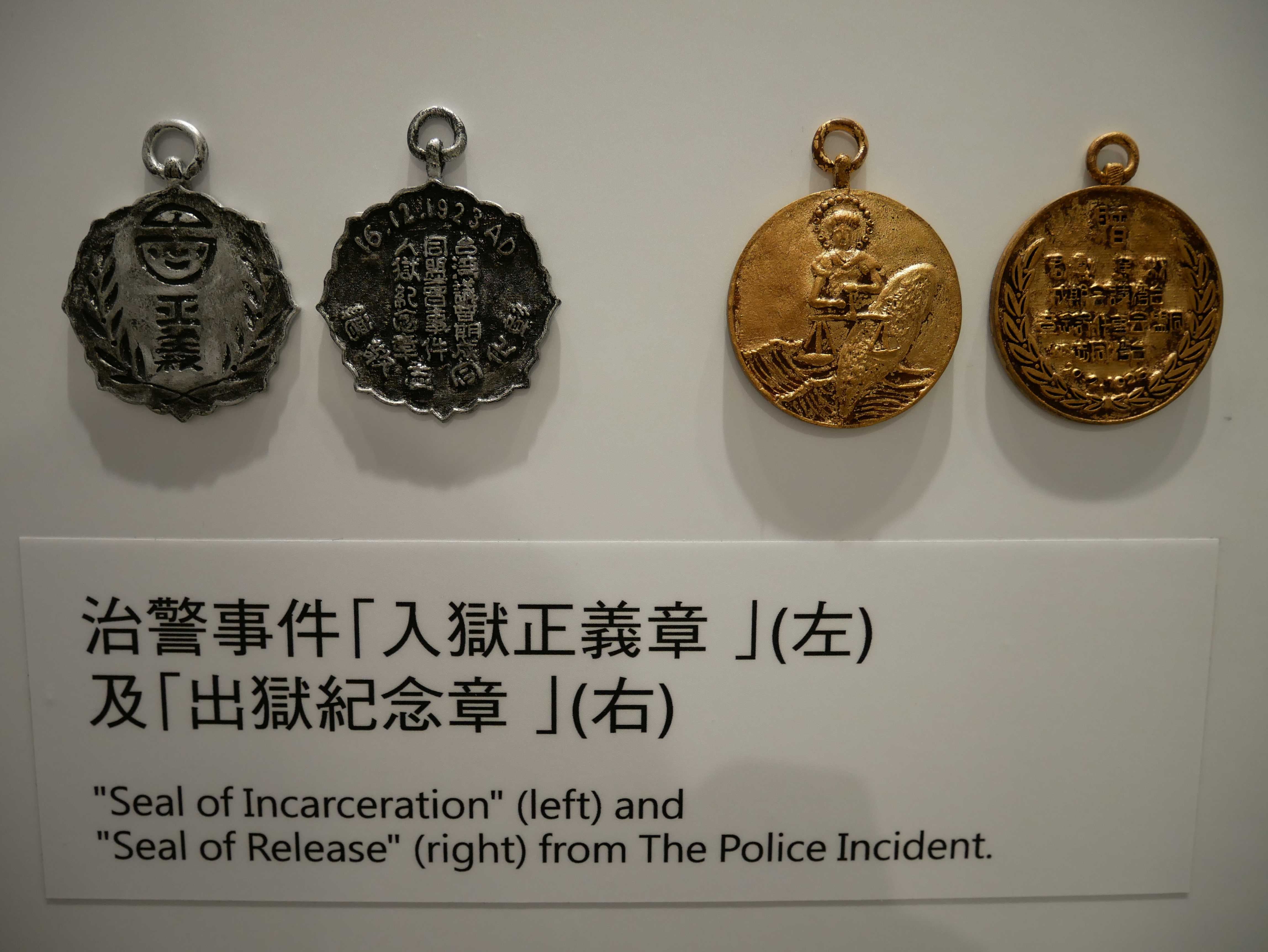 中文（台灣）: 治警事件入獄紀念章與出獄紀念章，臺北市中正區東門次分區東門里